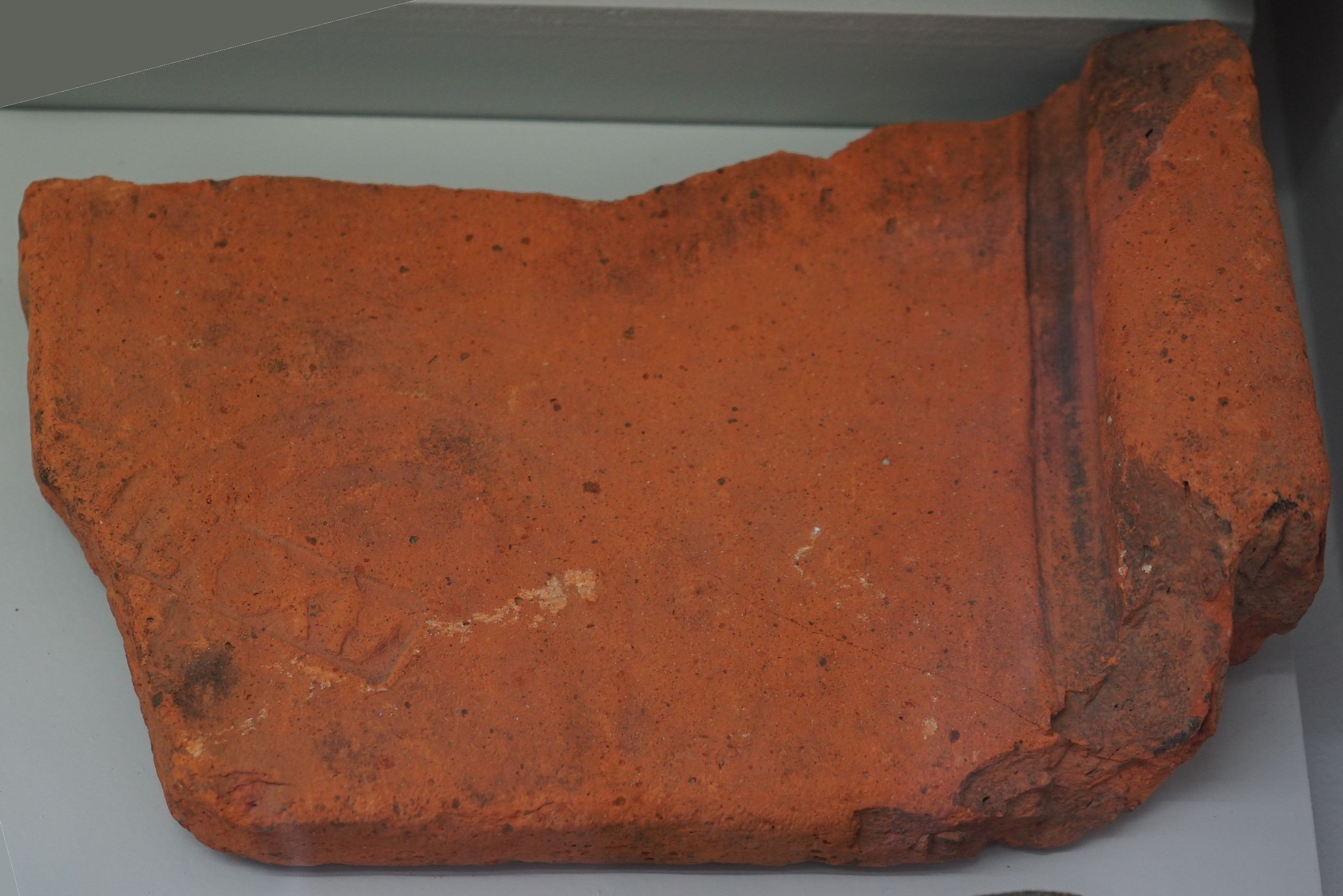 présenté au musée de Toul. AE 1974, 432: Leg(io) XV